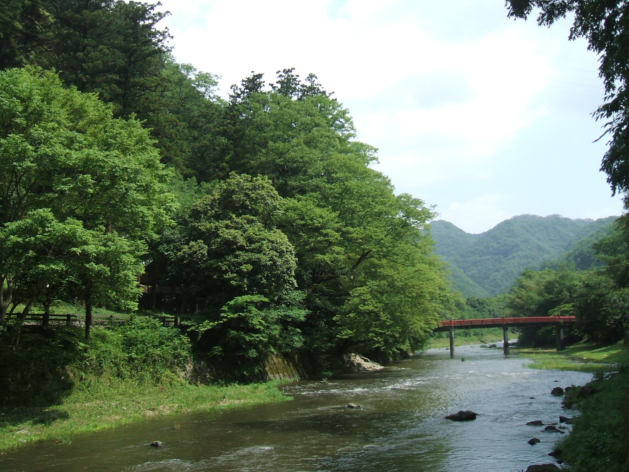 岡山県井原市の渓谷「天神峡」、中央に流れるのが小田川で橋は紅葉橋という。